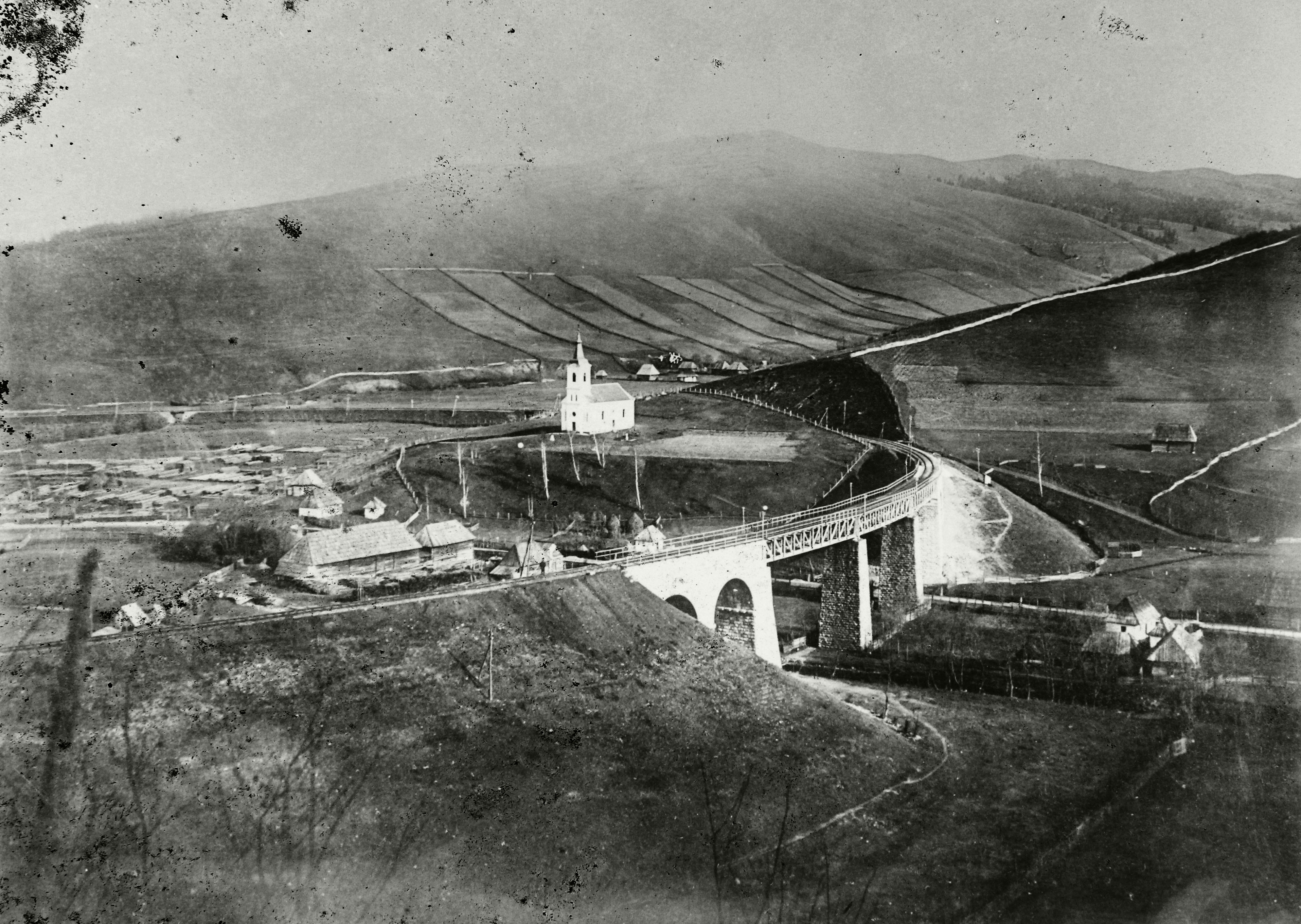 kilátás a völgyhíd és a Szent András-templom felé. Location: Romania, Transylvania, Lunca de Sus Tags: railway bridge Title: kilátás a völgyhíd és a Szent András-templom felé.